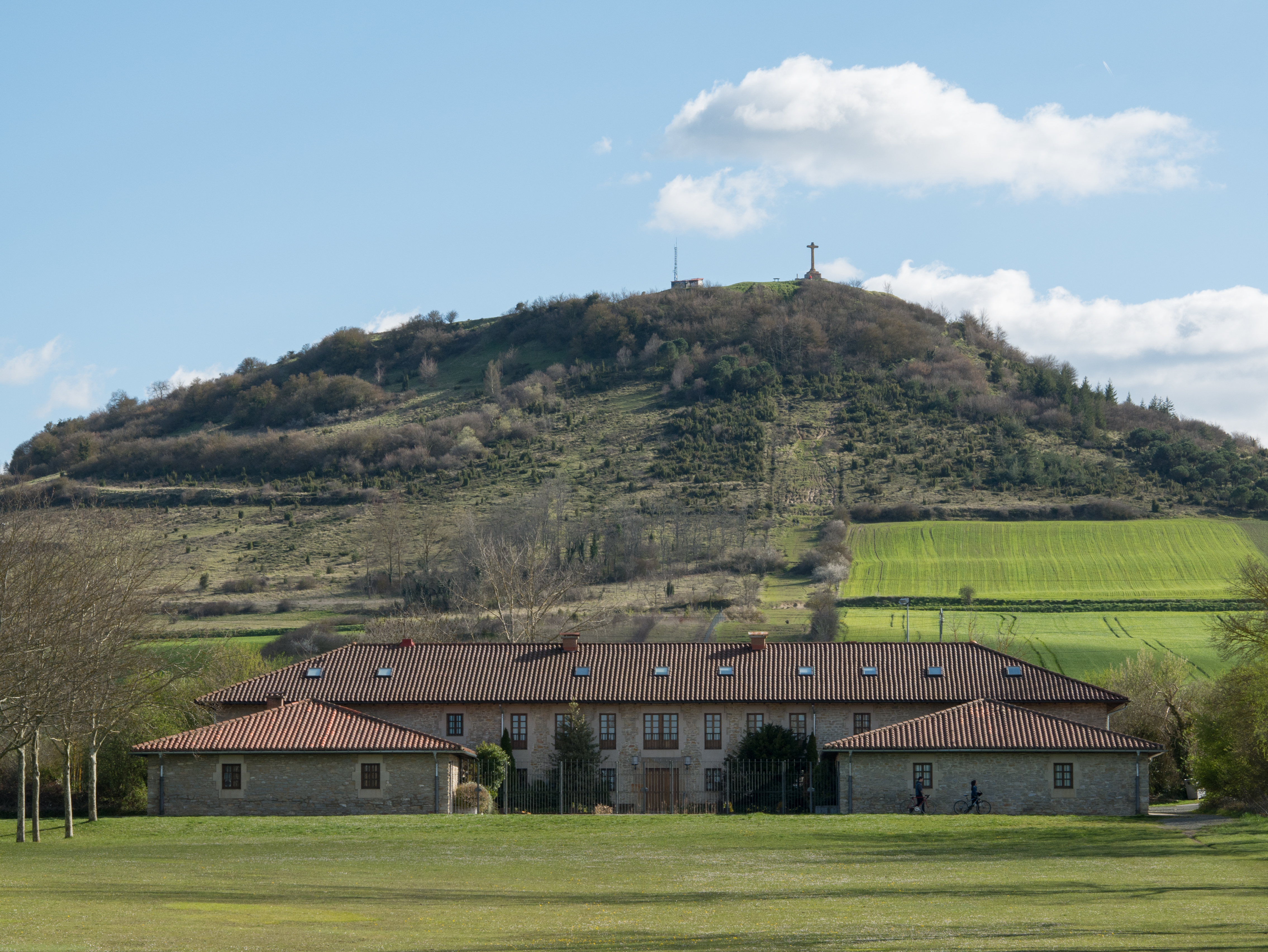 Casa de la Dehesa en las Campas de Olarizu. Campas y Monte Olarizu. Vitoria-Gasteiz, País Vasco, España